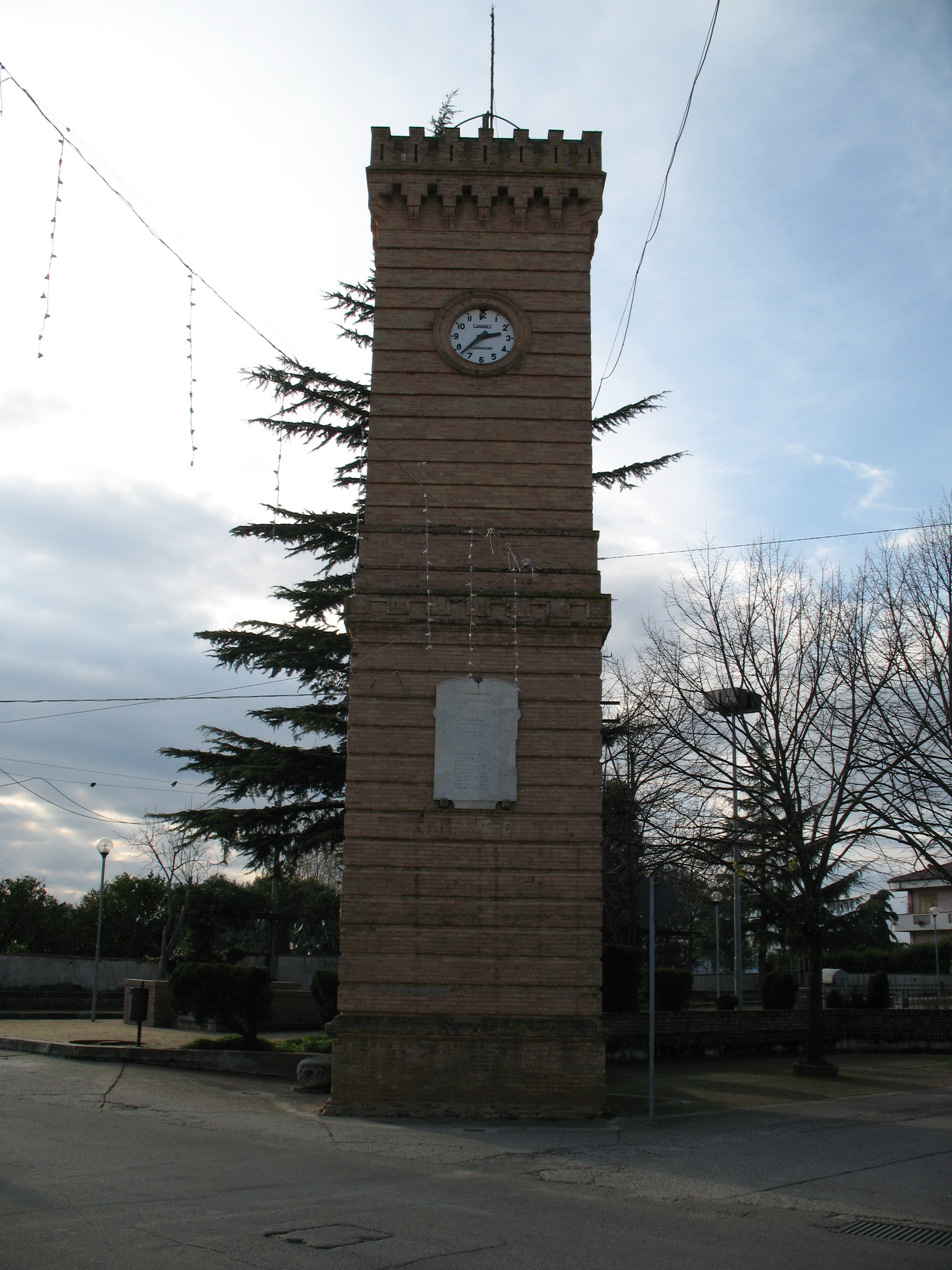 Terranova Sappo Minulio, torre dell'orologio